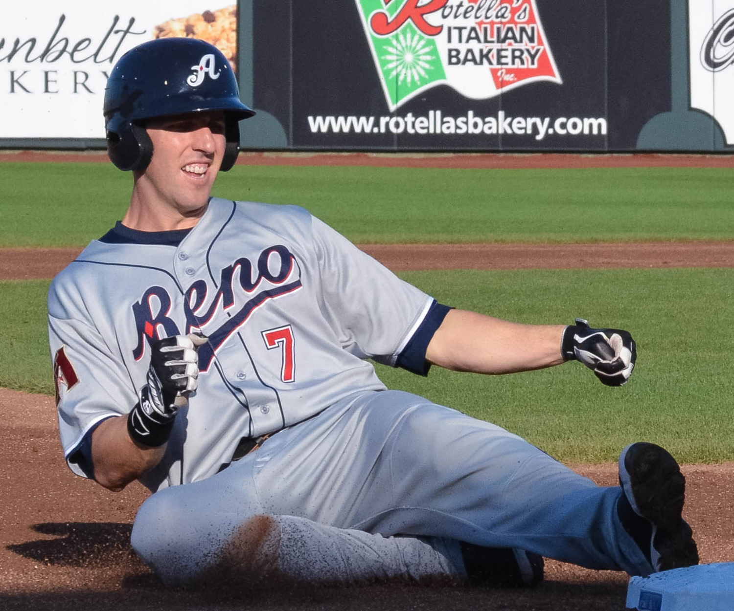 Danny Dorn